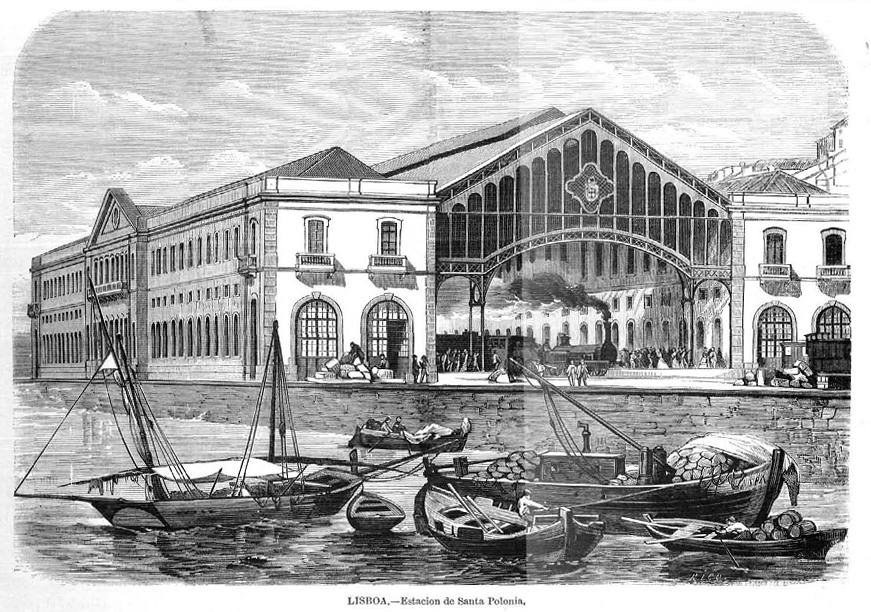 Lisboa, estación de Santa Apolonia, en la revista española La Ilustración Española y Americana.